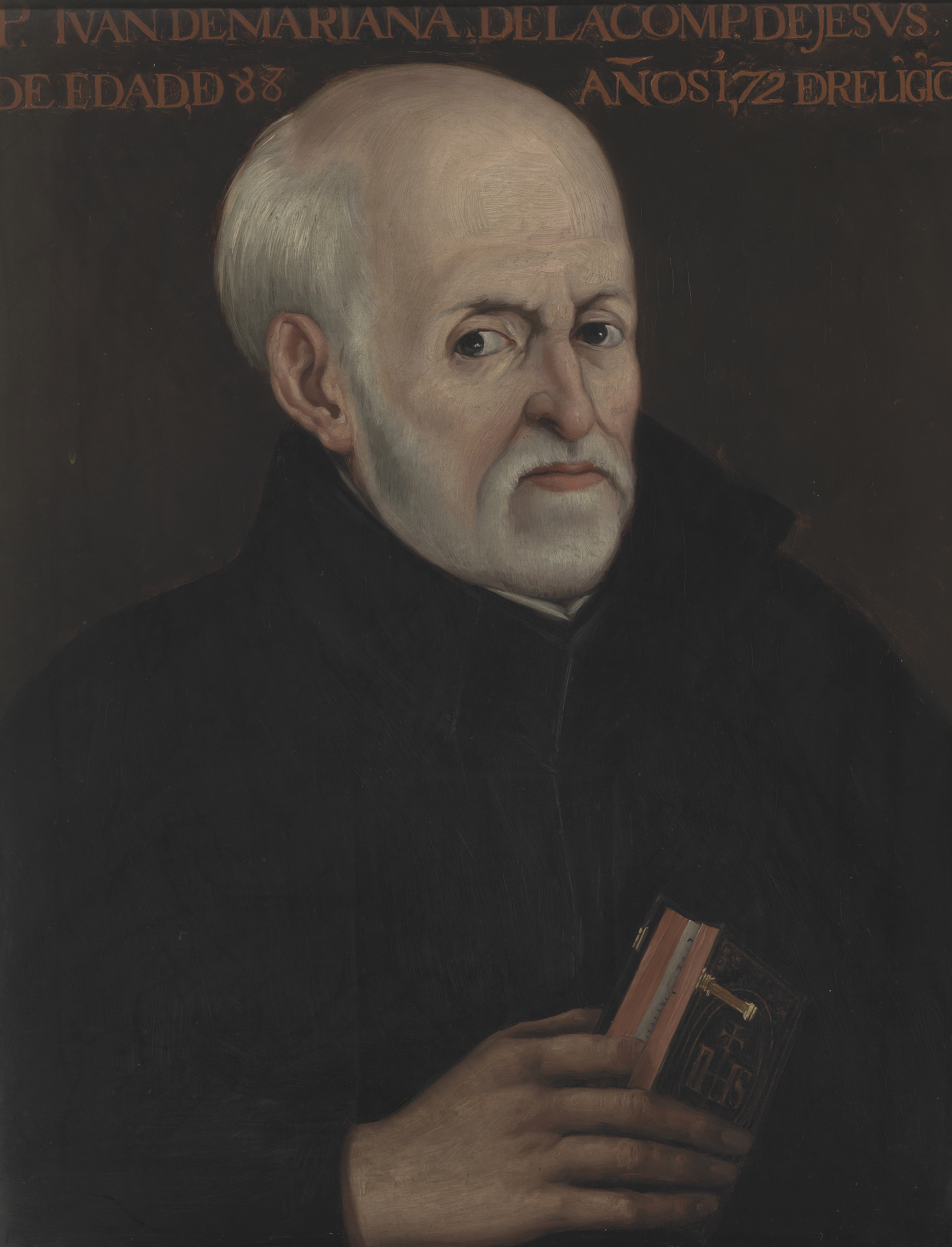 Retrato del eclesiástico e historiador español Juan de Mariana (1536-1624), que fue también jesuita y teólogo. Esta obra es una copia del retrato de este historiador conservado en la biblioteca del Palacio arzobispal de Toledo.